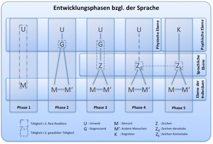 Entwicklungsphasen bzgl. der Sprache